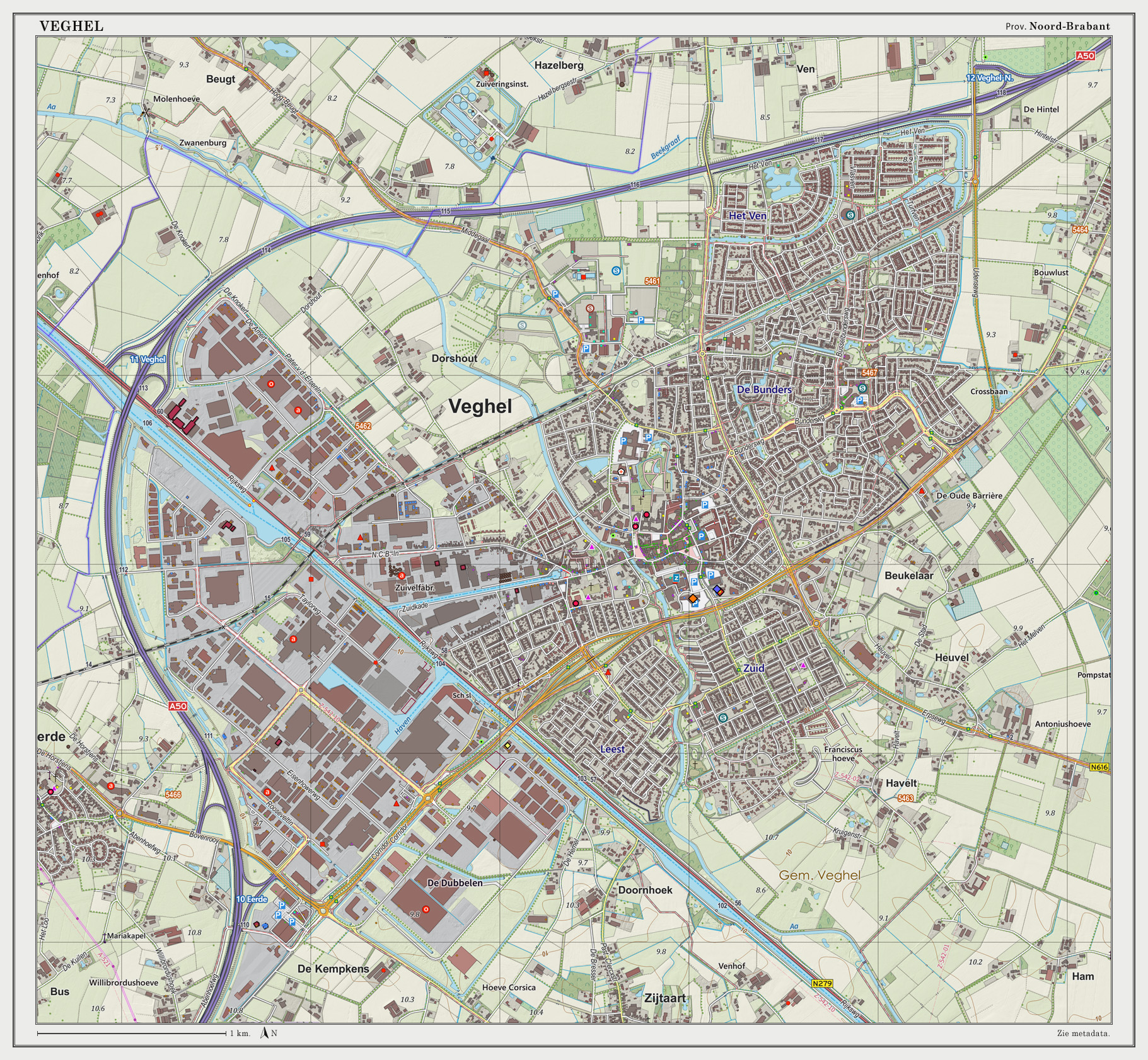 Topografische kaart van Veghel (bevolkingskern). Resolutie: 300 pixels/km. Kaartbeeld samengesteld uit de open geodata van de Top10NL en Top25namen (Basisregistratie Topografie, Kadaster), Creative Commons BY licentie. Gebouwvlakken uit open geodata BAG extract. Wegen uit de OpenStreetMap. Reliëfschaduw uit de Actuele Hoogtekaart AHN2. Samenstelling en kleurenschema: Jan-Willem van Aalst, met QGIS2. Zie ook de Legenda.